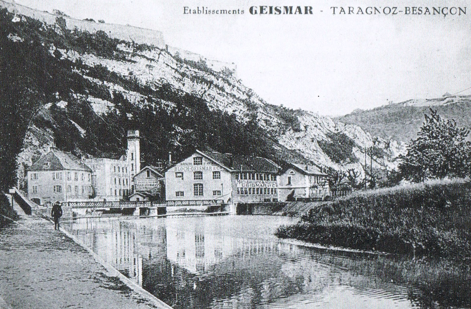 L'horlogerie Geismar, à Besançon (Doubs, France).